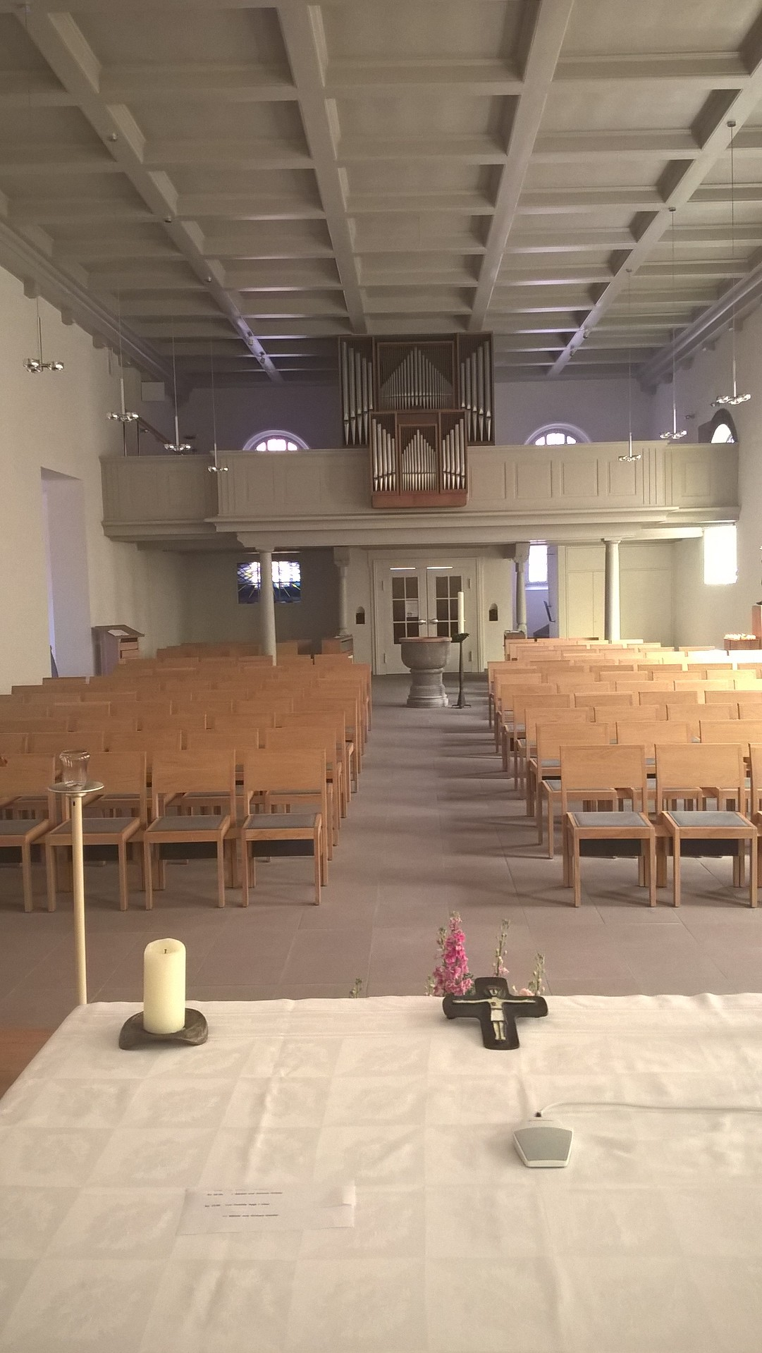 St.-Michael-Kirche in Leer, Ostfriesland